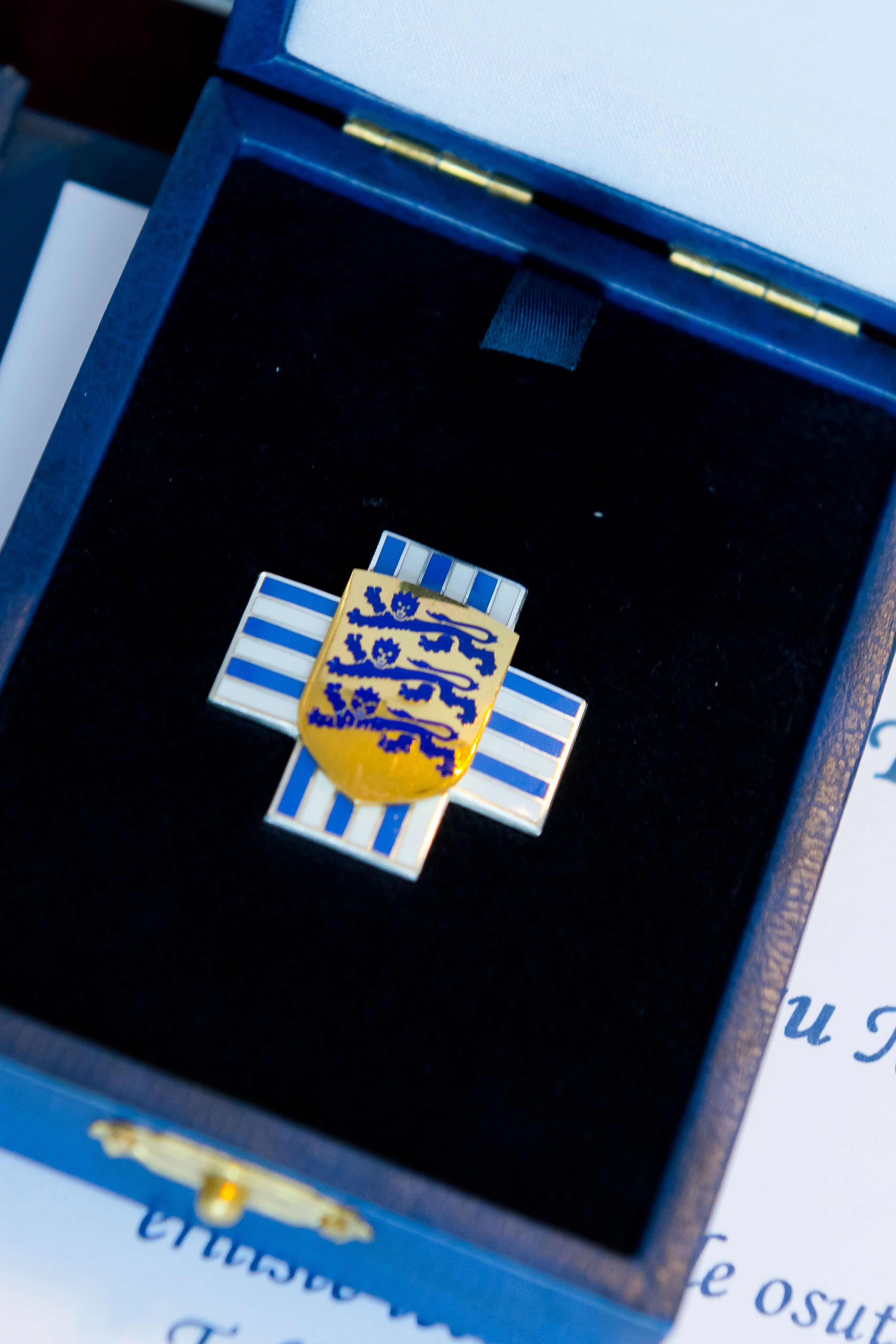 Tallinna teenetemärk